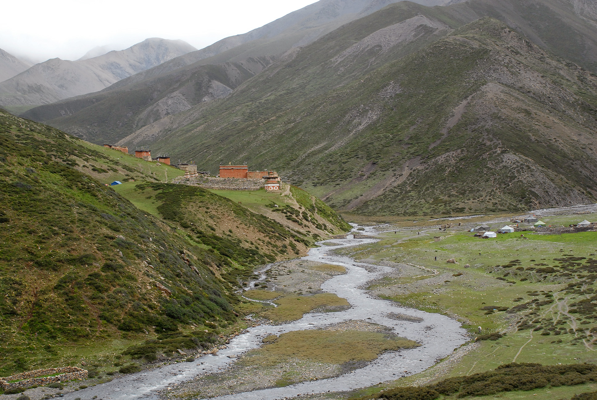 Saldang, Nepal